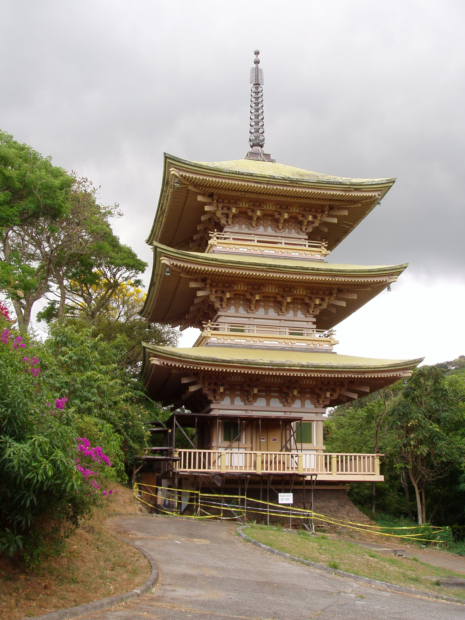 Sanju Pagoda - Kyoto Gardens of Honolulu Memorial Park, Honolulu, Hawaii, USA.